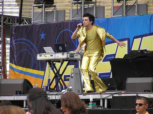 Cantante Ale Sergi en Reventon Superestrella 2006, LA Coliseum. Tomada por el usuario Cool Pixels de Flickr y utilizada bajo los permisos correspondientes de Creative Commons.